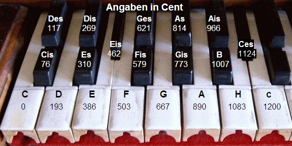 Abwandlung Cembalo universale (Ogeum Weener): Tastatur mit Subsemitonien. Je nach Verwendung - zum Beispiel als Cis oder als Des - unterscheiden sich die schwarzen Tasten sowie His und C bzw. Eis und F um 41 Cent.